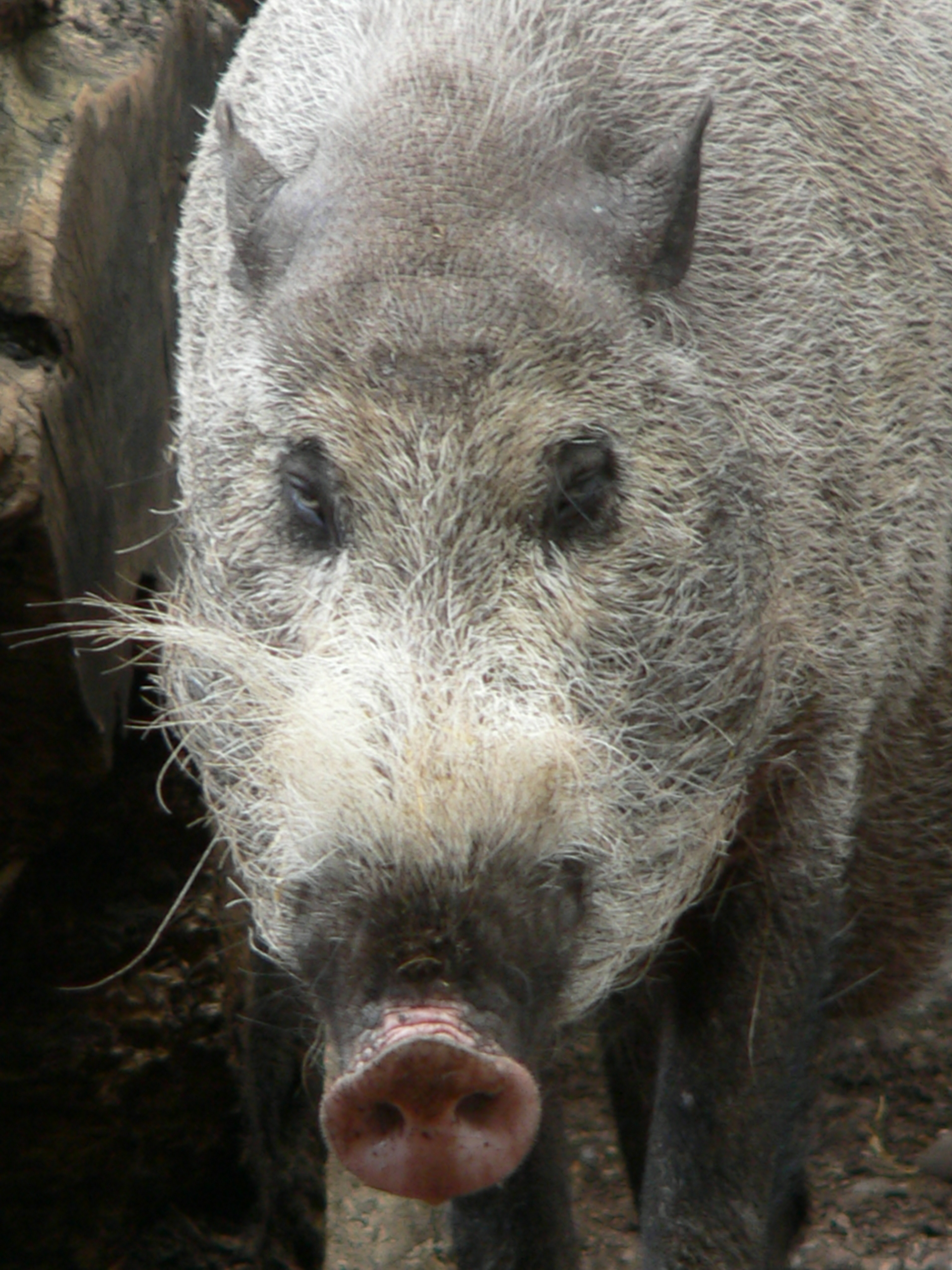 Sus barbatus